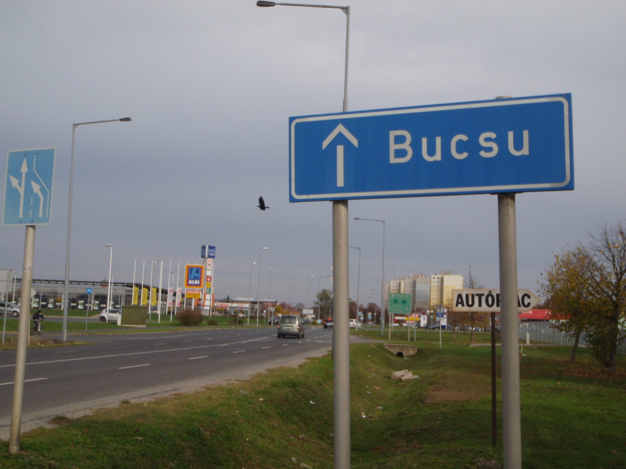 Egykori kék alapú KRESZ főúti útirány jelző tábla